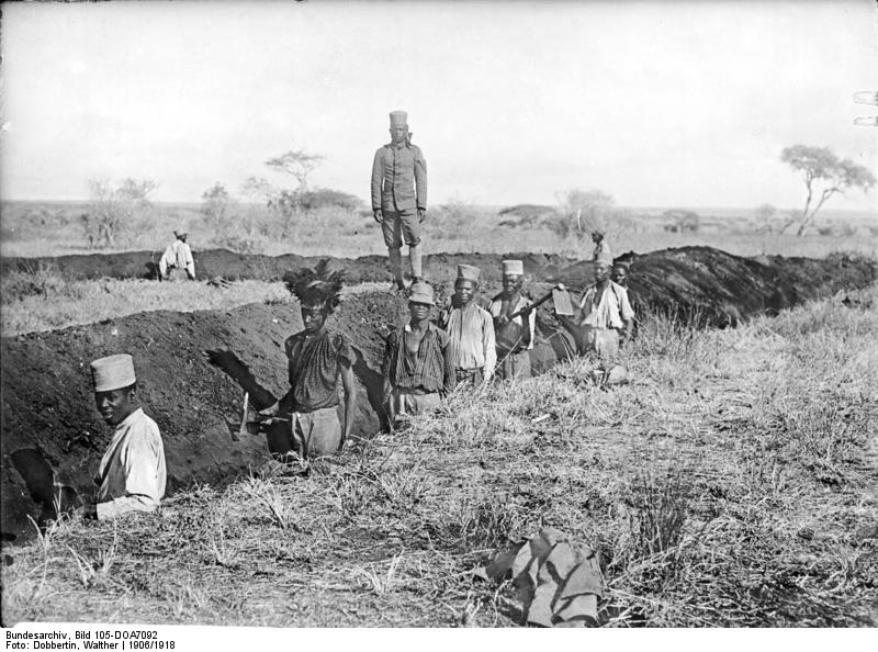 Askari